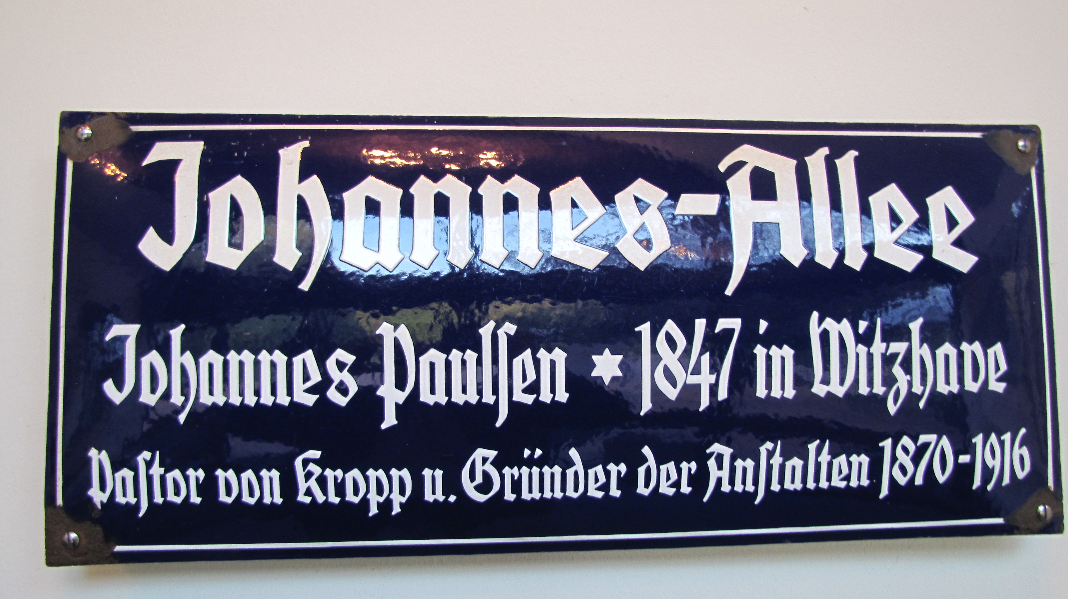 street sign Johannes-Allee in memory of Pastor and founder Johannes Paulsen, Diakoniewerk Kropp